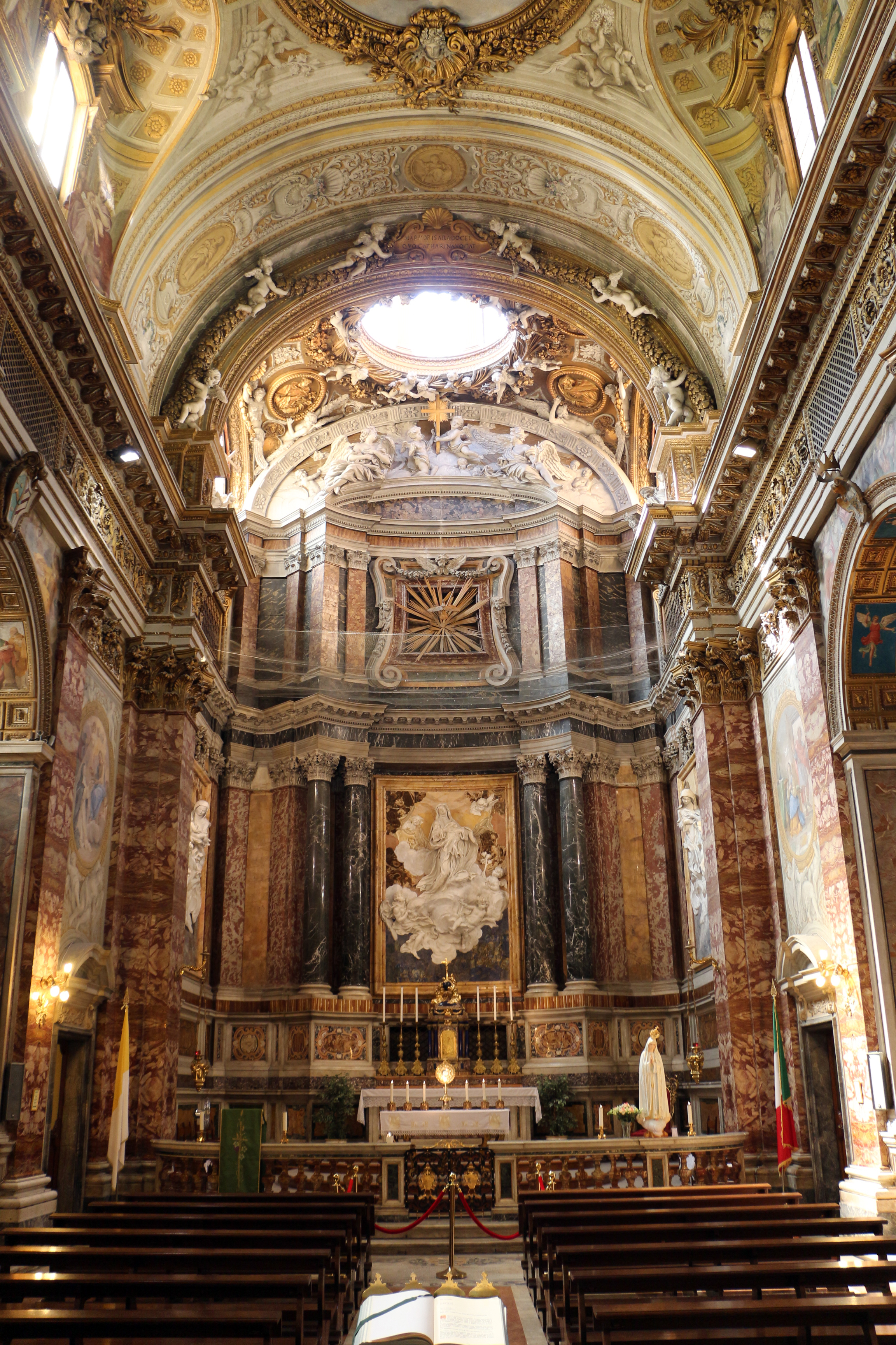 Roma, chiesa di santa caterina a magnanapoli, interno 02.JPG